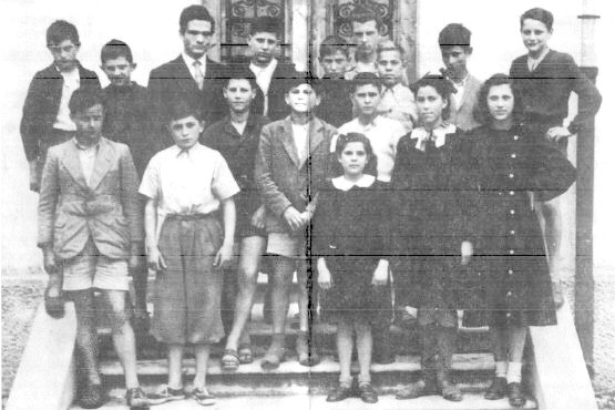 Pier Paolo Pasolini avec des élèves de l'Academiuta di lenga furlana.